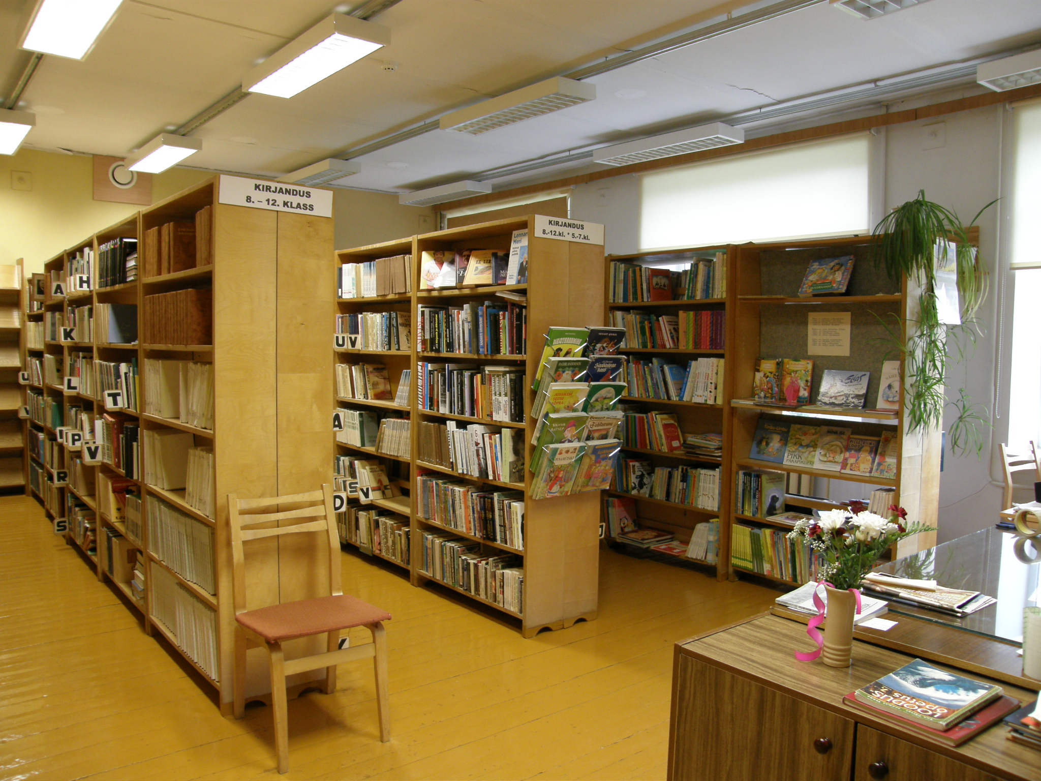 Valga Gümnaasiumi raamatukogu